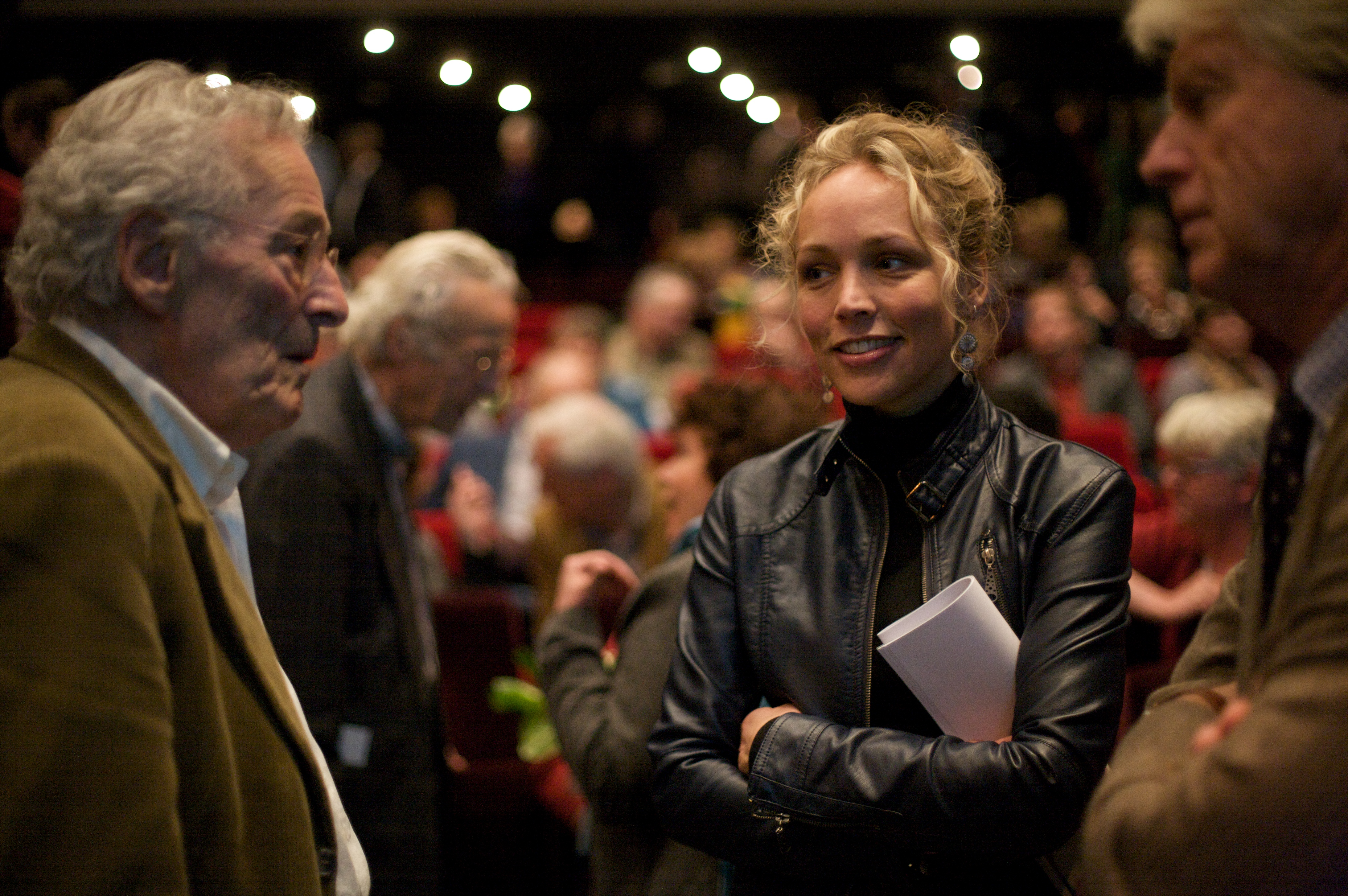 D66 congres 07-11-09 Breda